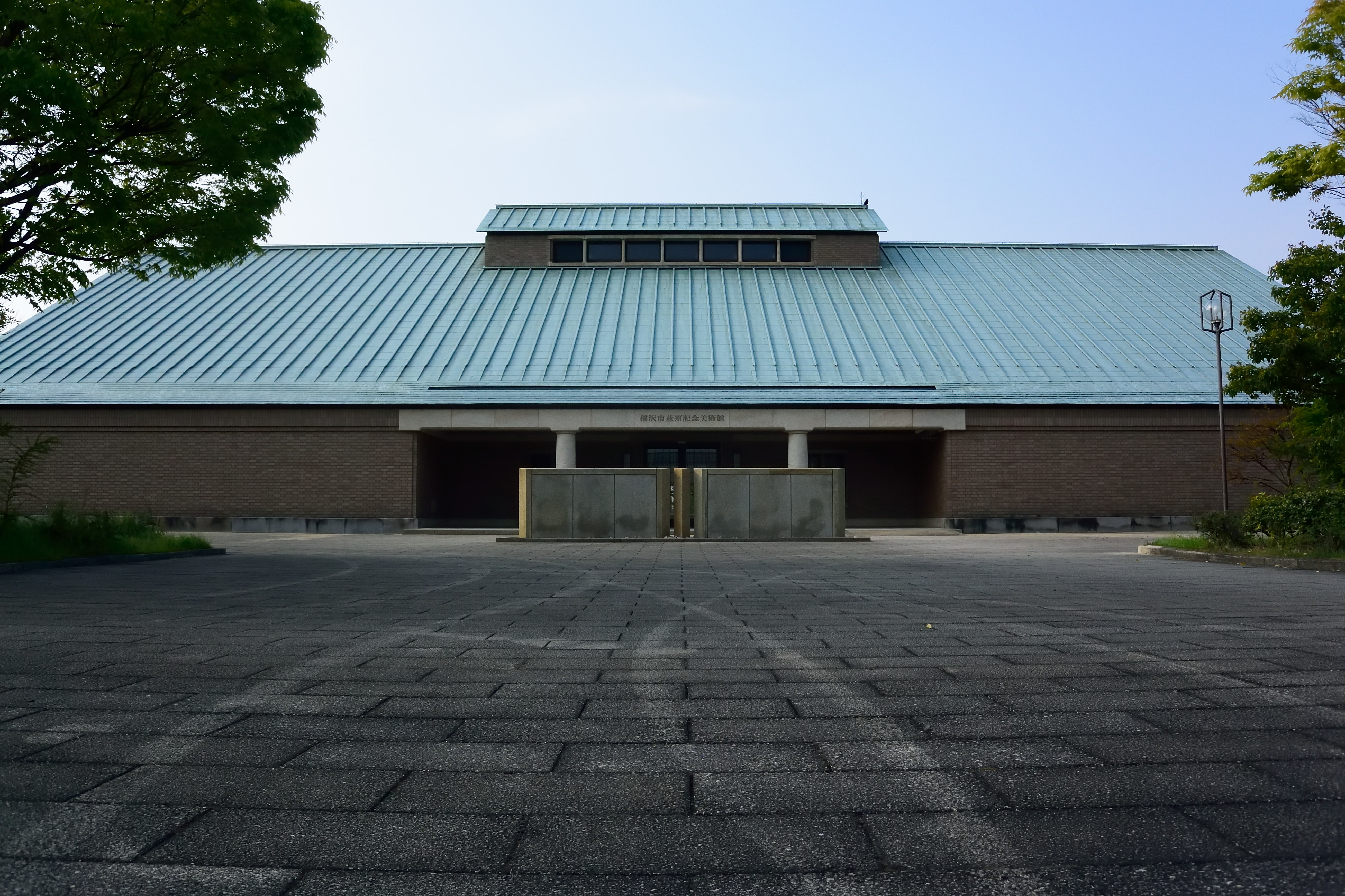 稲沢市荻須記念美術館